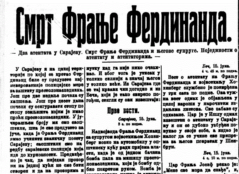 Исечак из Политике од 16. јуна 1914 Извор: Дигитална Народна библиотека Србије, [dead link]